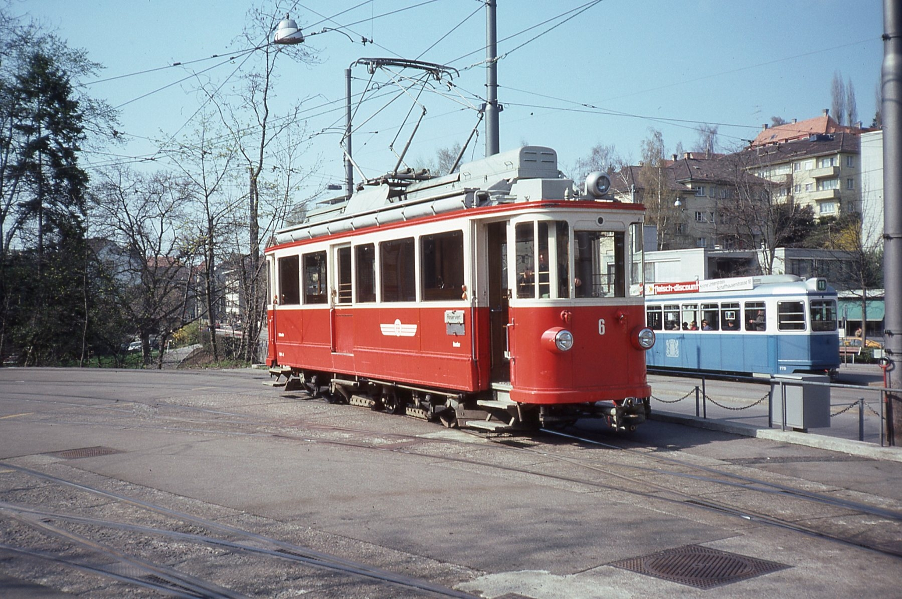 Photo.Trams aux Fils. Photo prise en avril 1976 Le Forchbahn (FB) est une entreprise ferroviaire suisse dont la ligne de 16,6 km, est à voie métrique, conduisant de la gare de Zurich Stadelhofen vers Forch ...